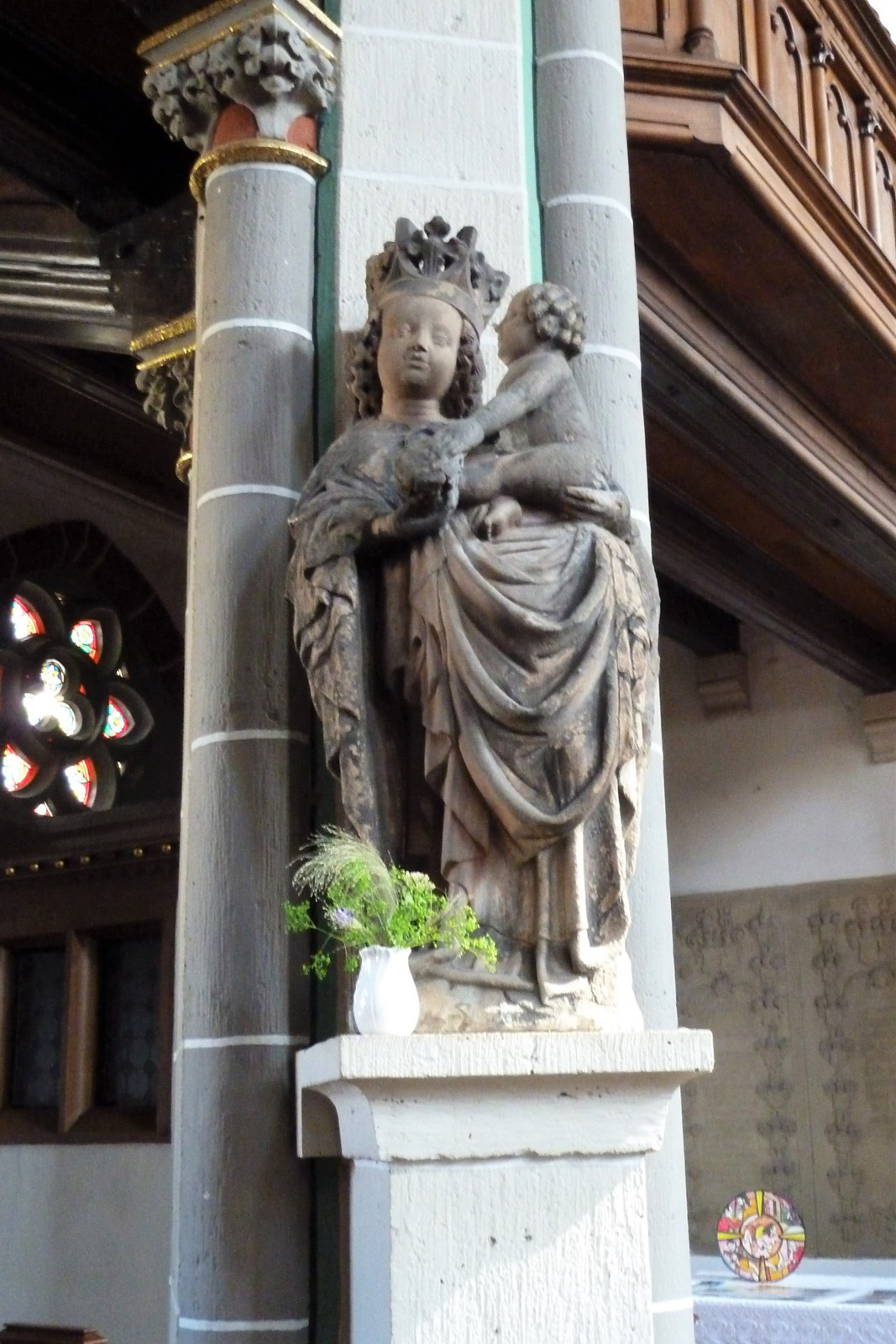 Die Steinerne Madonna aus dem 14. Jahrhundert in der Stadtkirche Meiningen